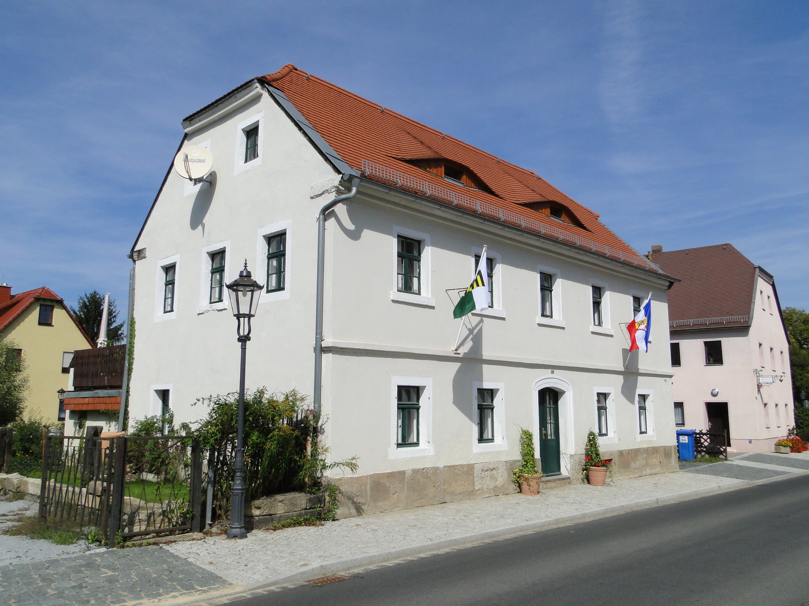 Kulturdenkmal Altlockwitz 33 Dresden